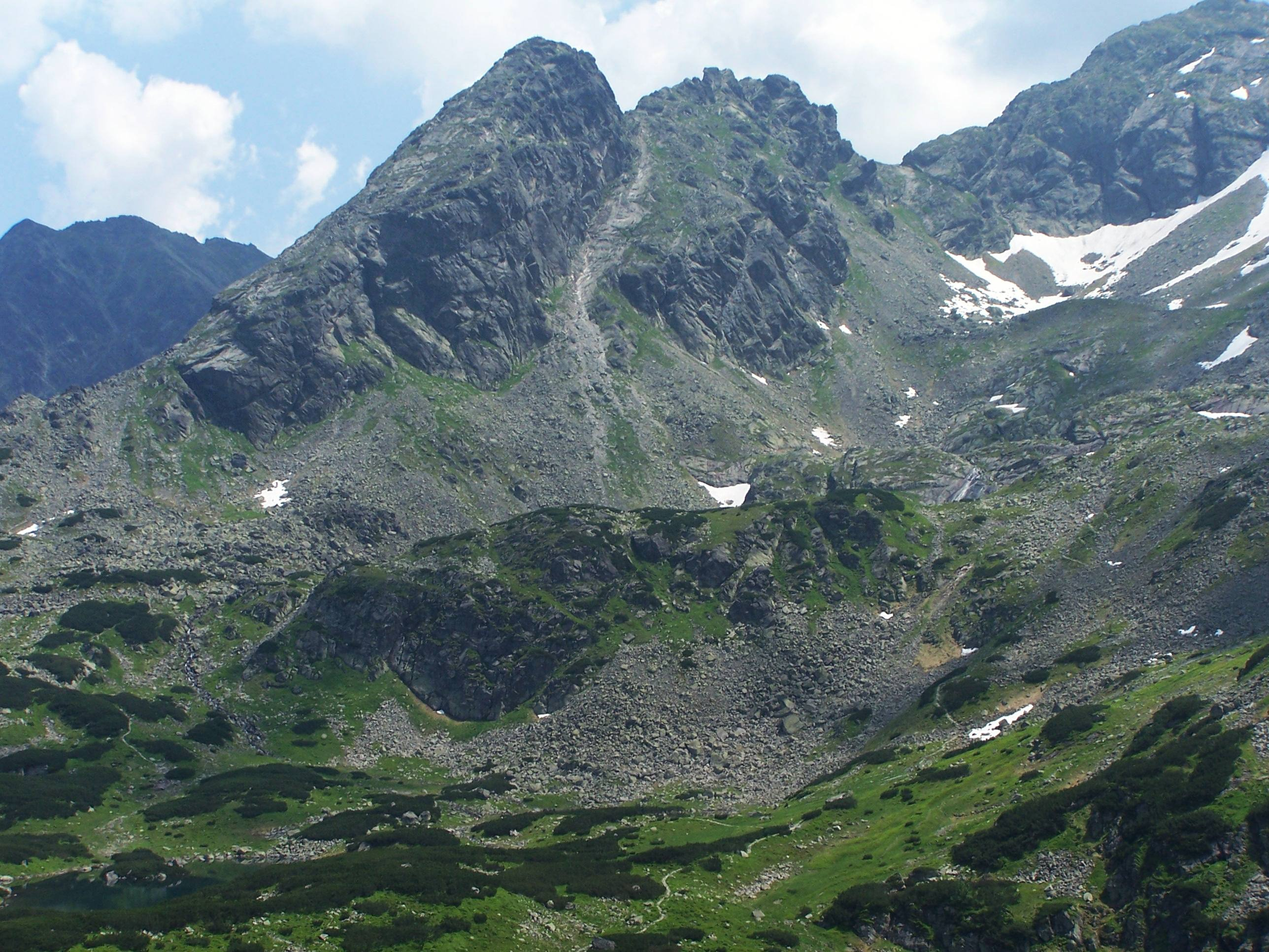 Kościelec (Tatra Mountains)